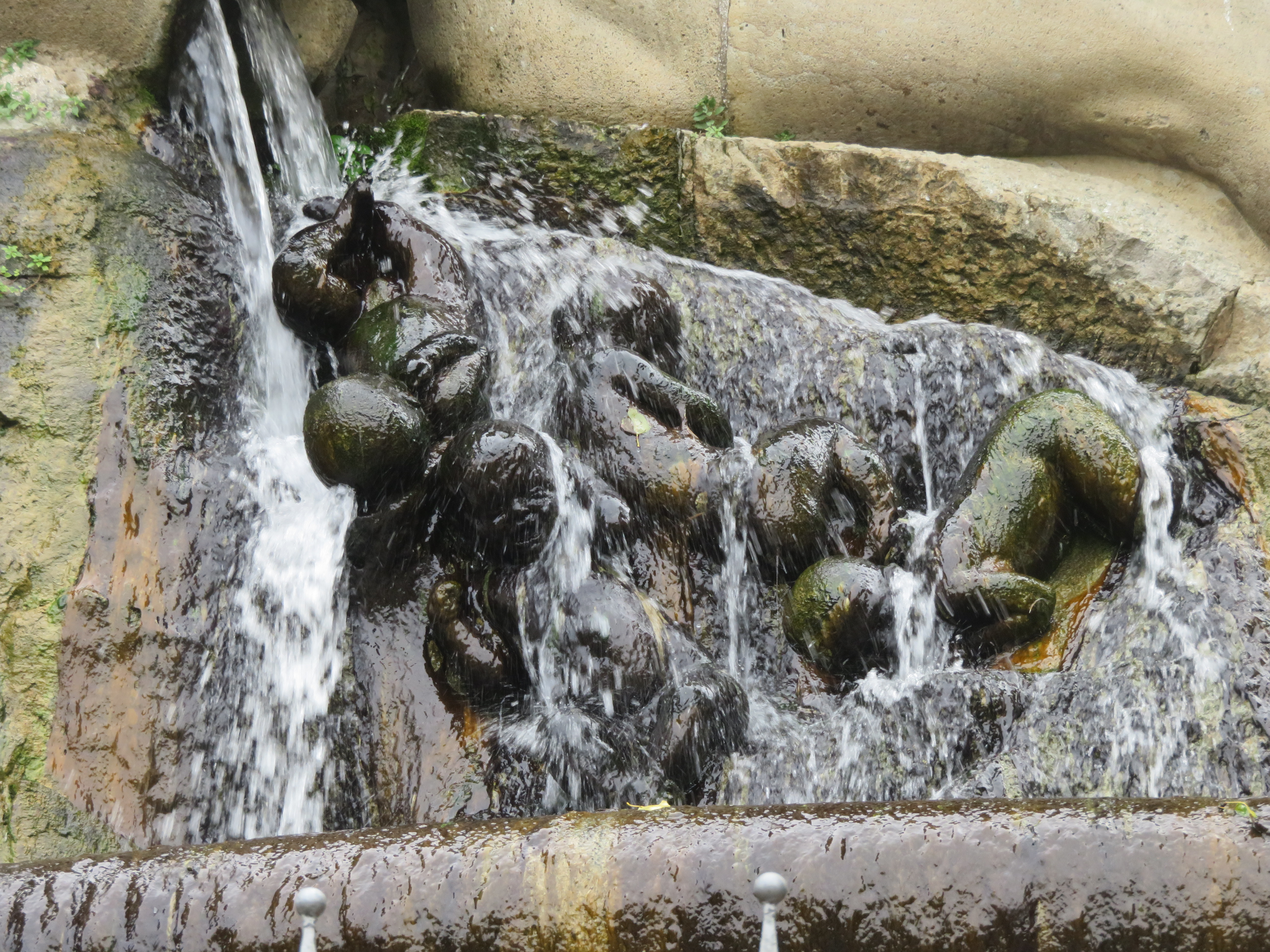 Il Po e i suoi affluenti. Fontana realizzata in cemento armato da Arrigo Minerbi per l'acquedotto monumentale di Ferrara in piazza XXIV Maggio. Particolare.